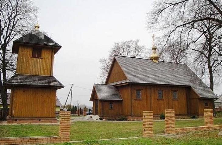 Horostyta, cerkiew prawosławna par. p.w. Podwyższenia Krzyża, XVII, XVIII